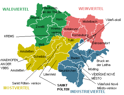 Mapa rakouské spolkové země Dolní Rakousy (s názvy okresů a čtvrtí). Opravil Kirk podle [1]